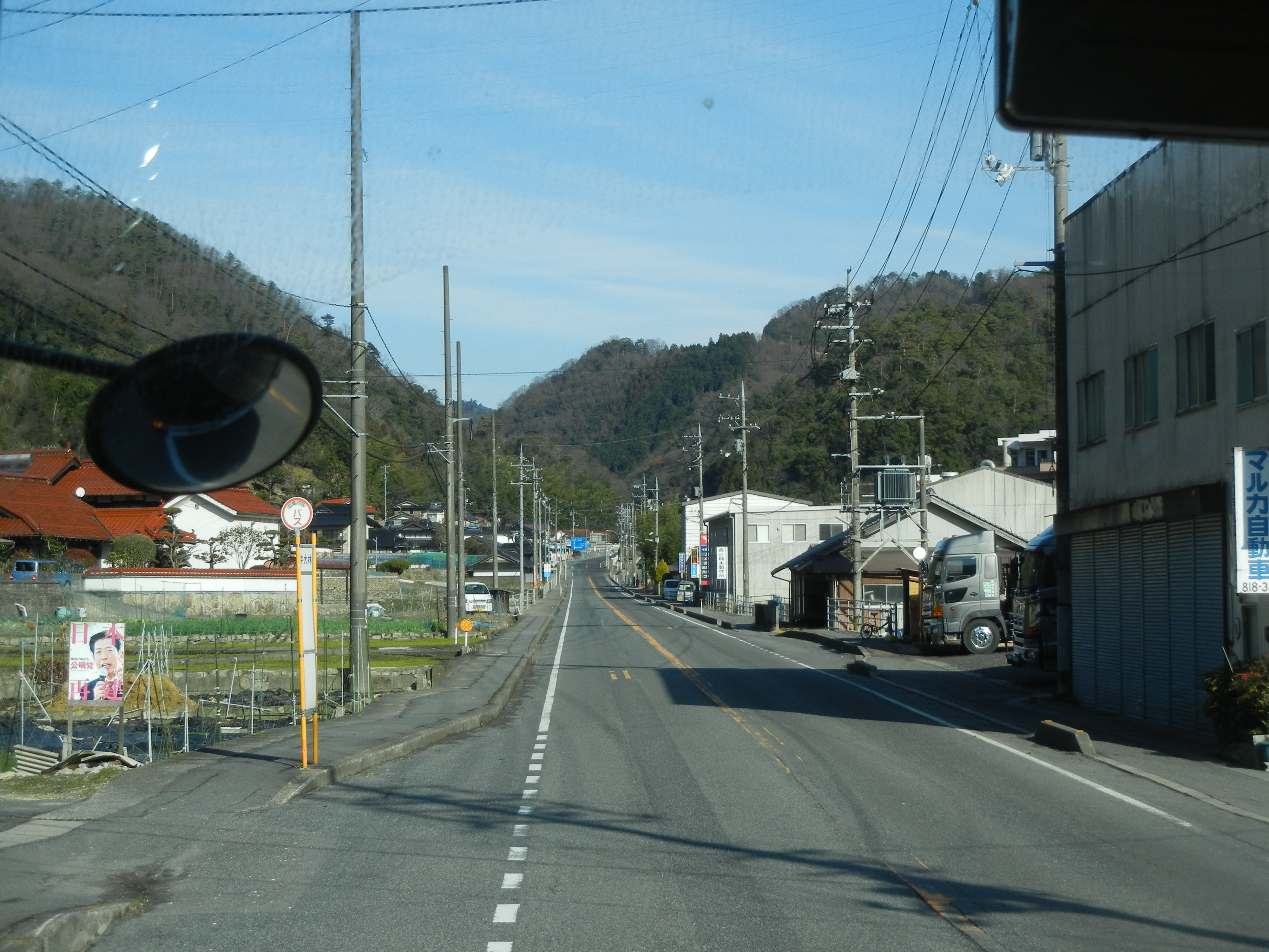 中大林バス停